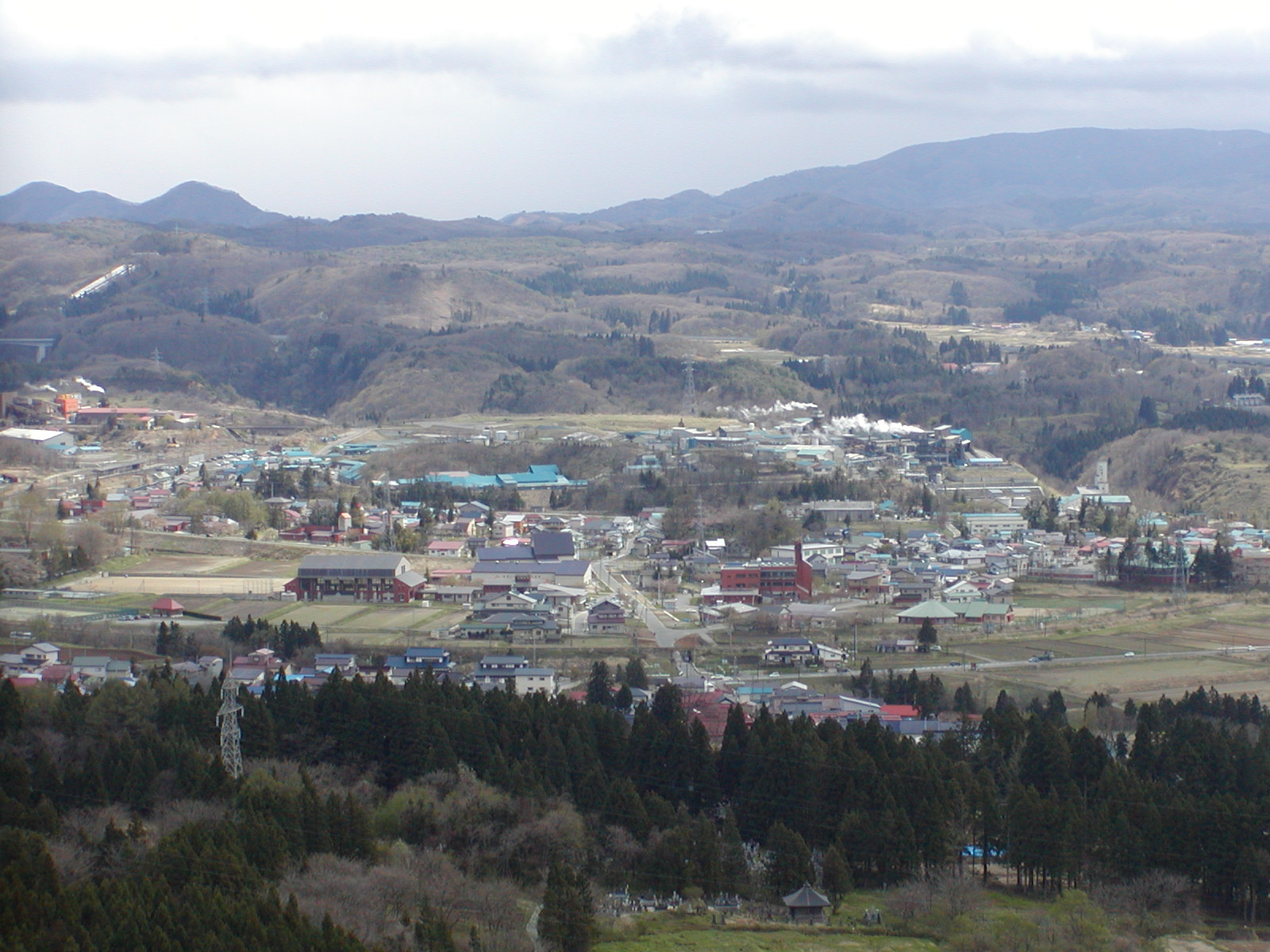 磐梯町全景